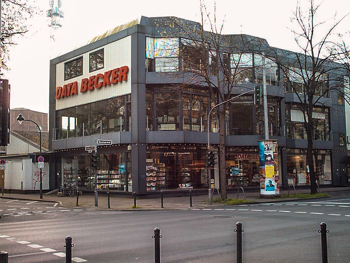 Firmenhauptsitz Data Becker in Düsseldorf-Bilk an der Merowingerstraße 30. Das Gebäude wurde 2014 abgerissen.